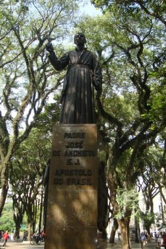 “Monumento a Anchieta“ (Padre José de Anchietta S.J. apostolo do Brasil), obra do artista plástico italiano Antonio Maria Nardi (1897-1973), localizado na Praça da Sé, cidade de São Paulo.